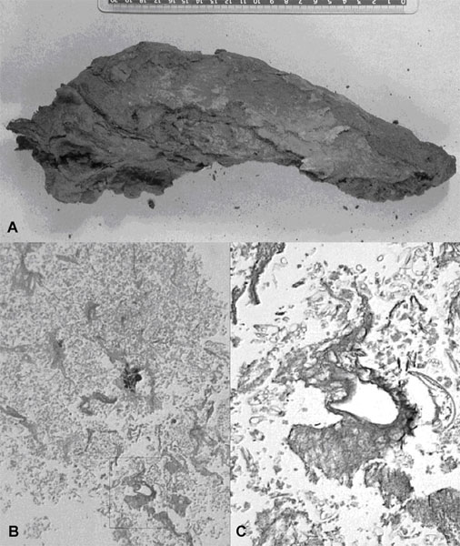 Esami sulla mummia di Cangrande della Scala